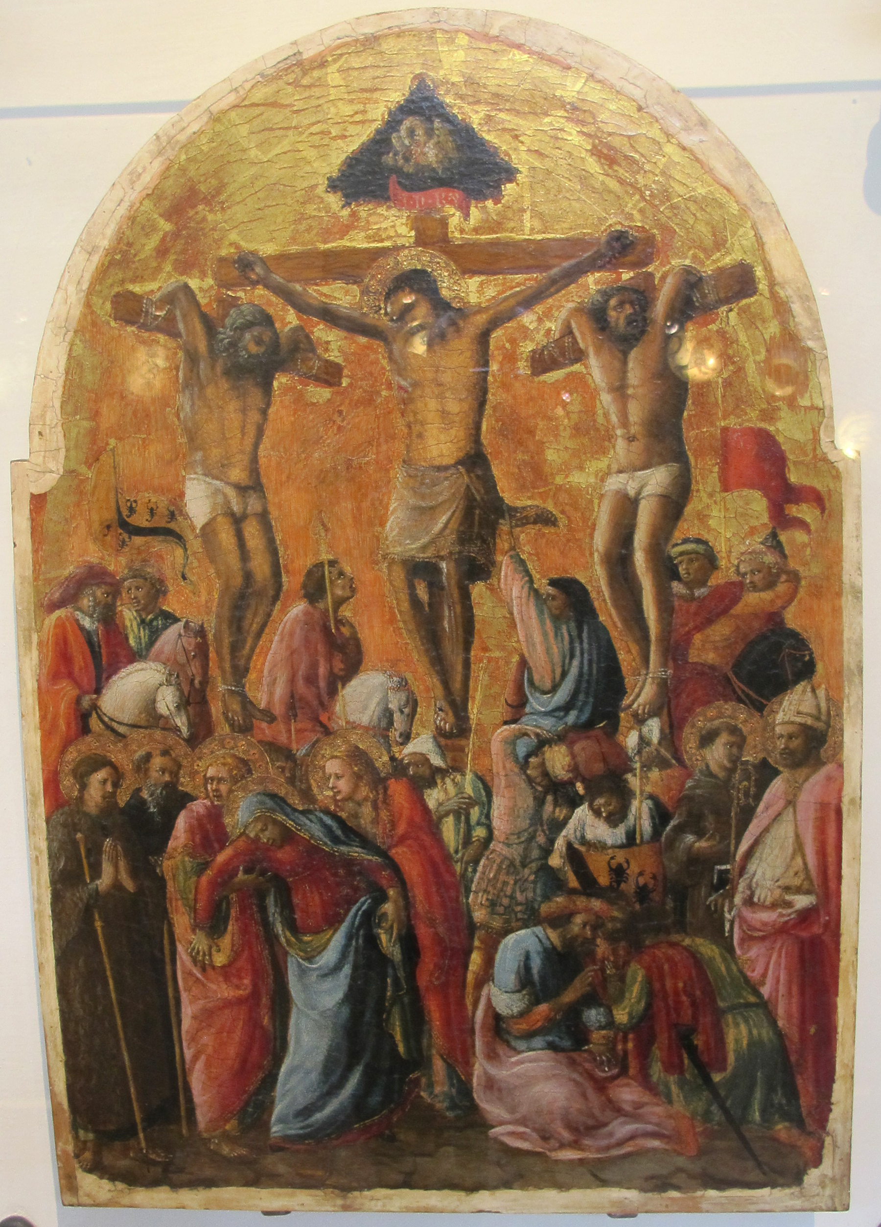 Museo diocesano (San Miniato)